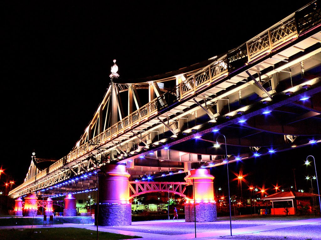 ponte inglesa, na rua sete de setembro